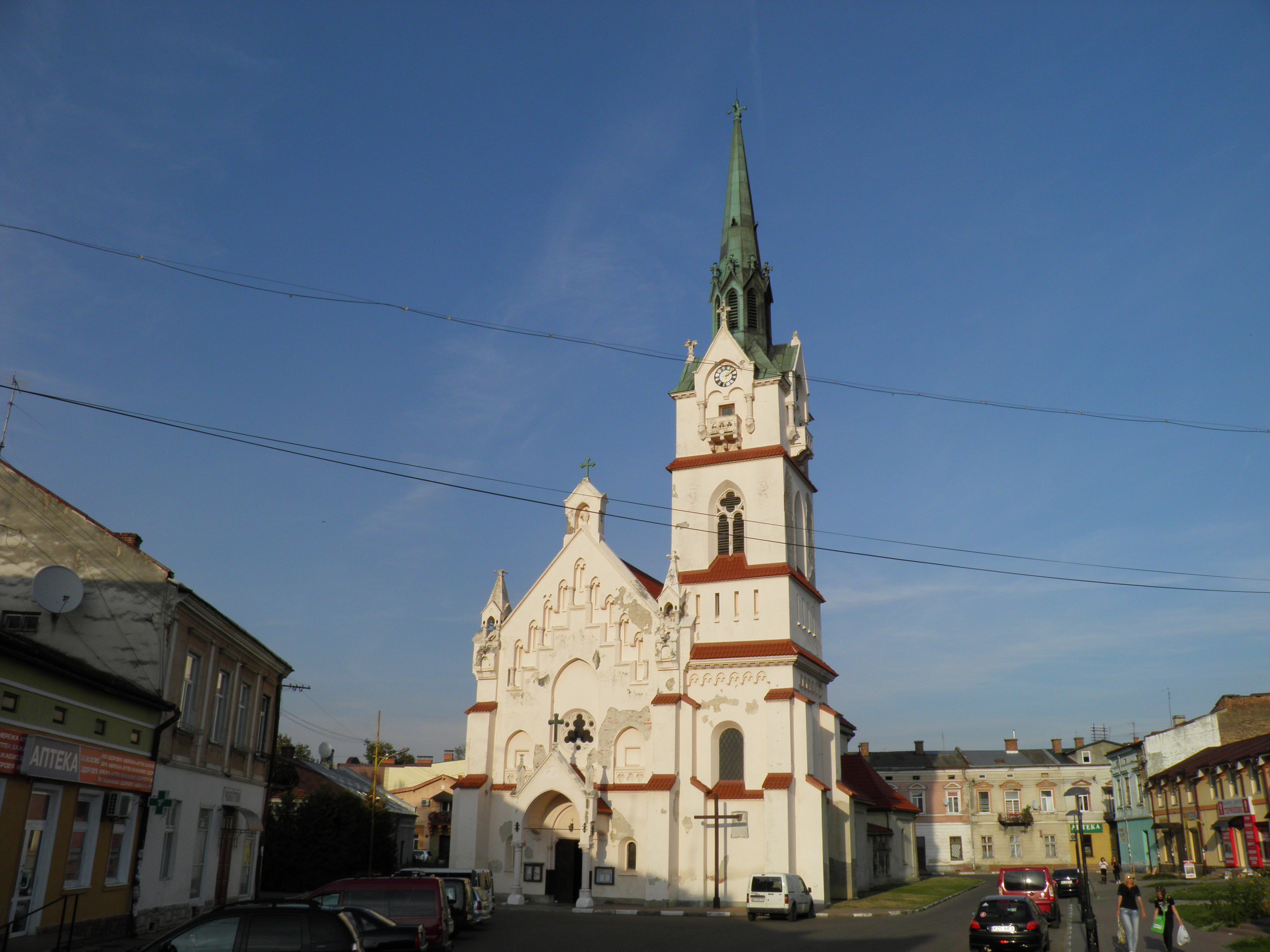 Костел Різдва Пресвятої Діви Марії, Стрий, вул. 22 Січня